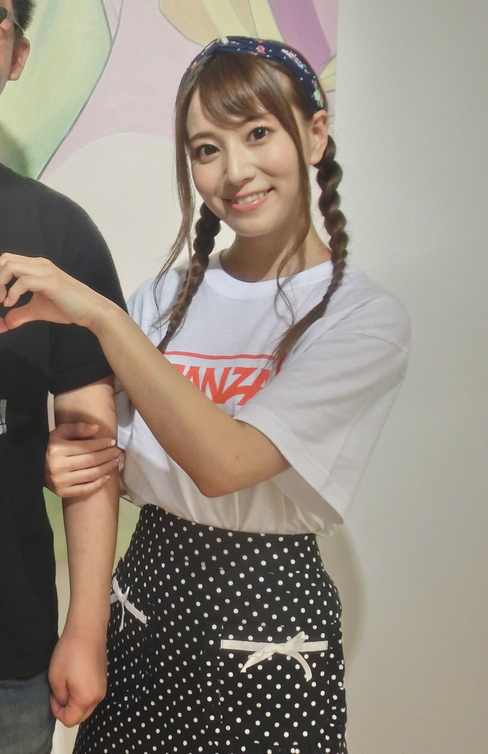 初川みなみ2018年